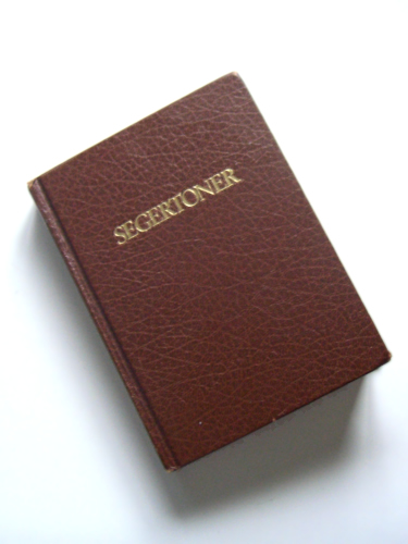 Segertoner är Pingströrelsens sångbok.